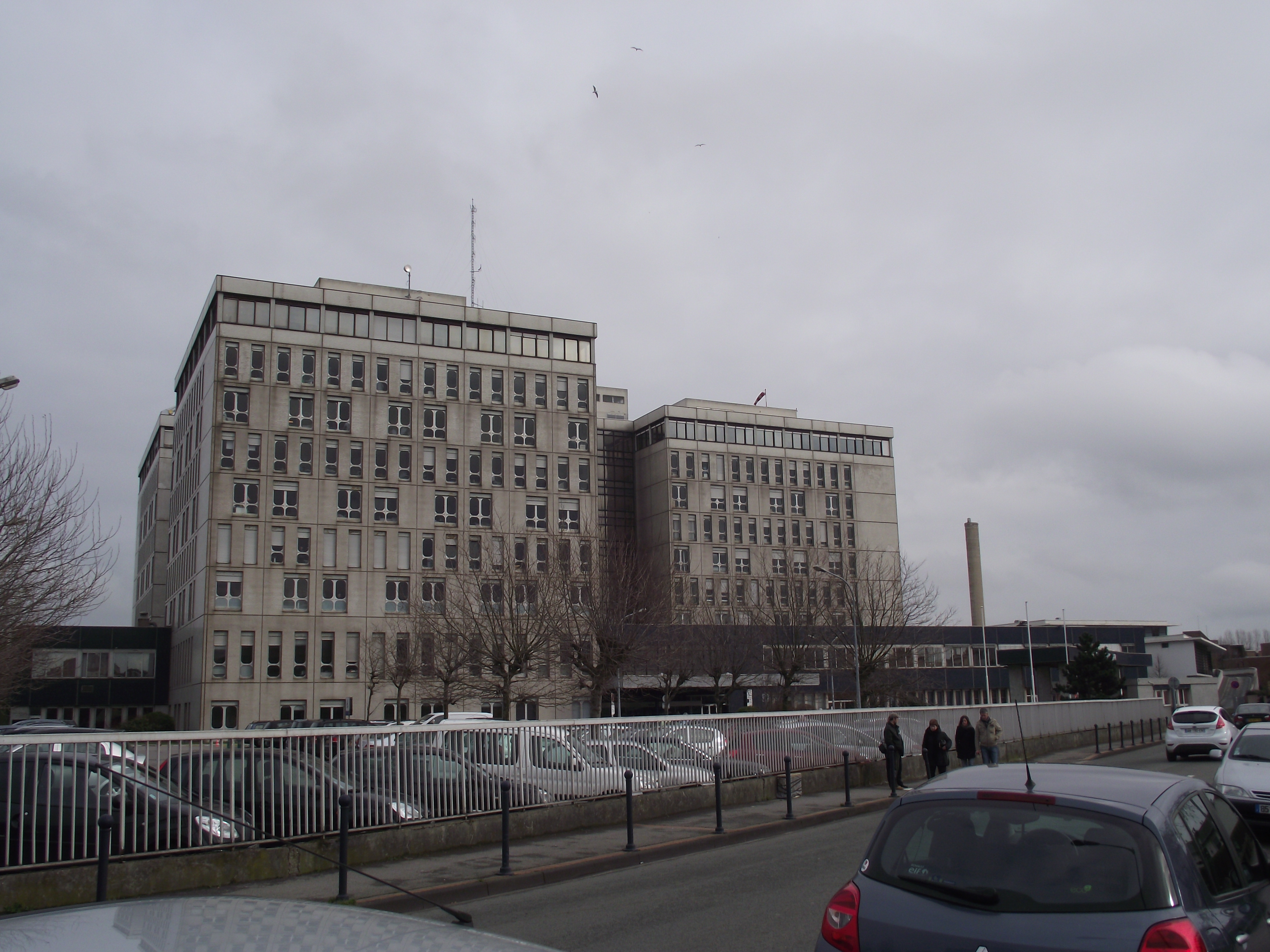 Le Centre Hospitalier de Dunkerque